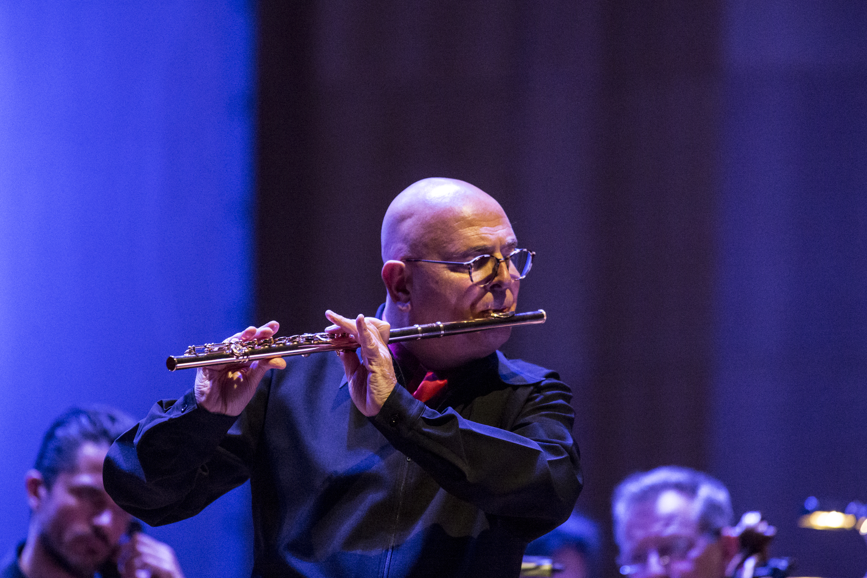 Giorgio Zagnoni mentre suona il Flauto